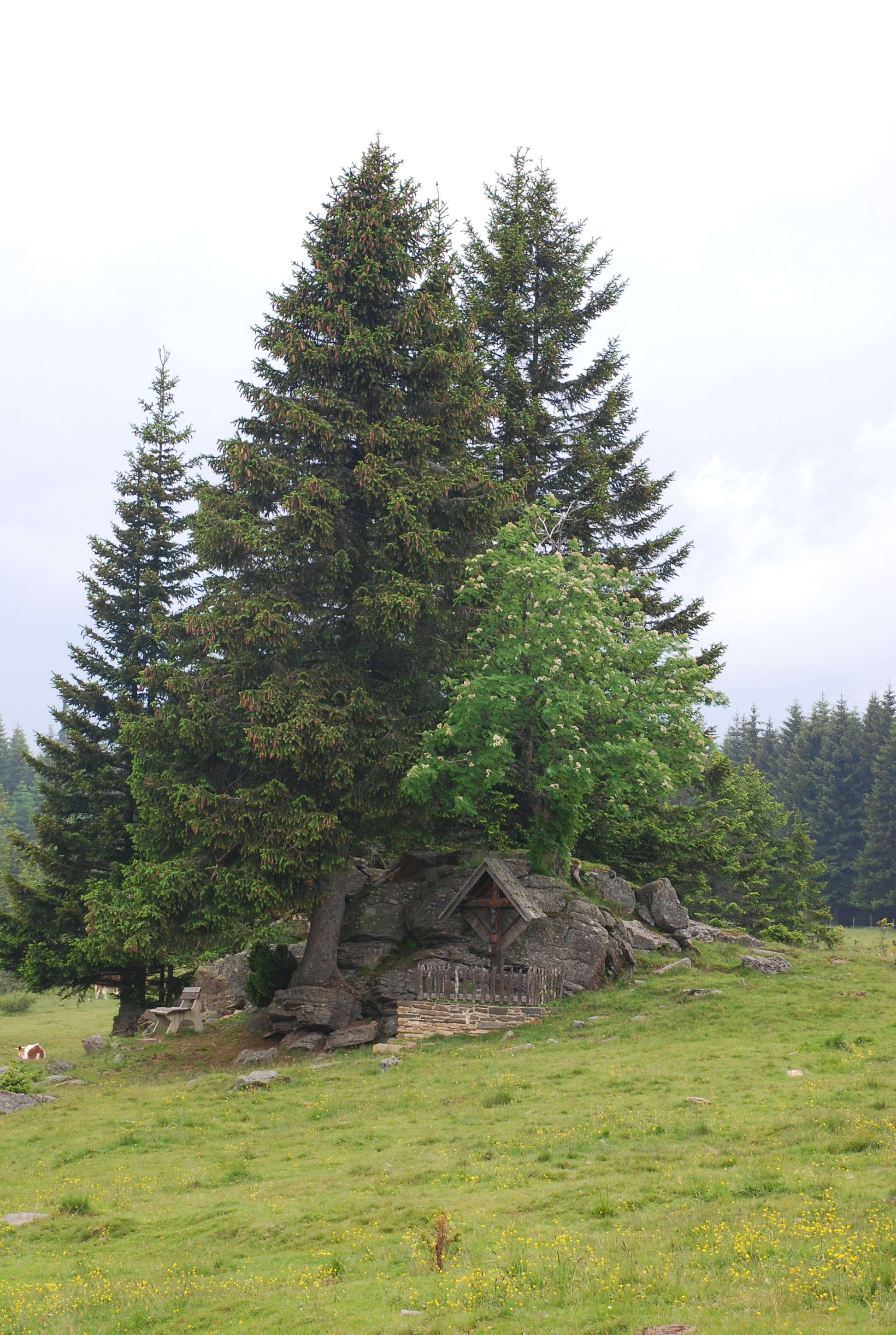 Wegkreuz mit Bauminsel auf der Hebalm